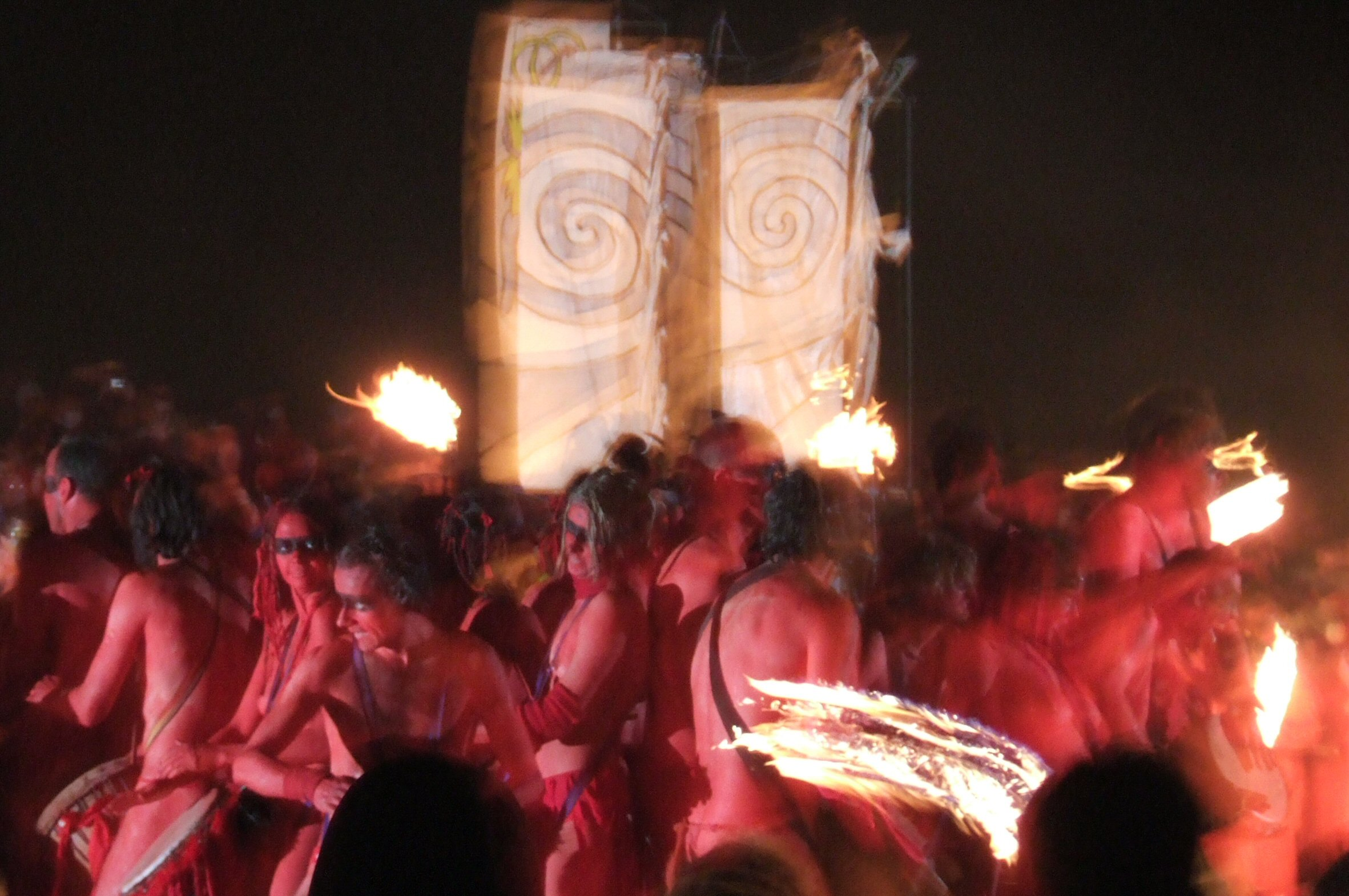 Beltane fire festival Beastie Drummers, 2006